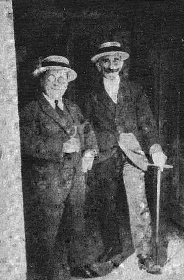 Julio Pérez de Guerra e José Vega Blanco en Lugo, fotografía en Vida Gallega 1920